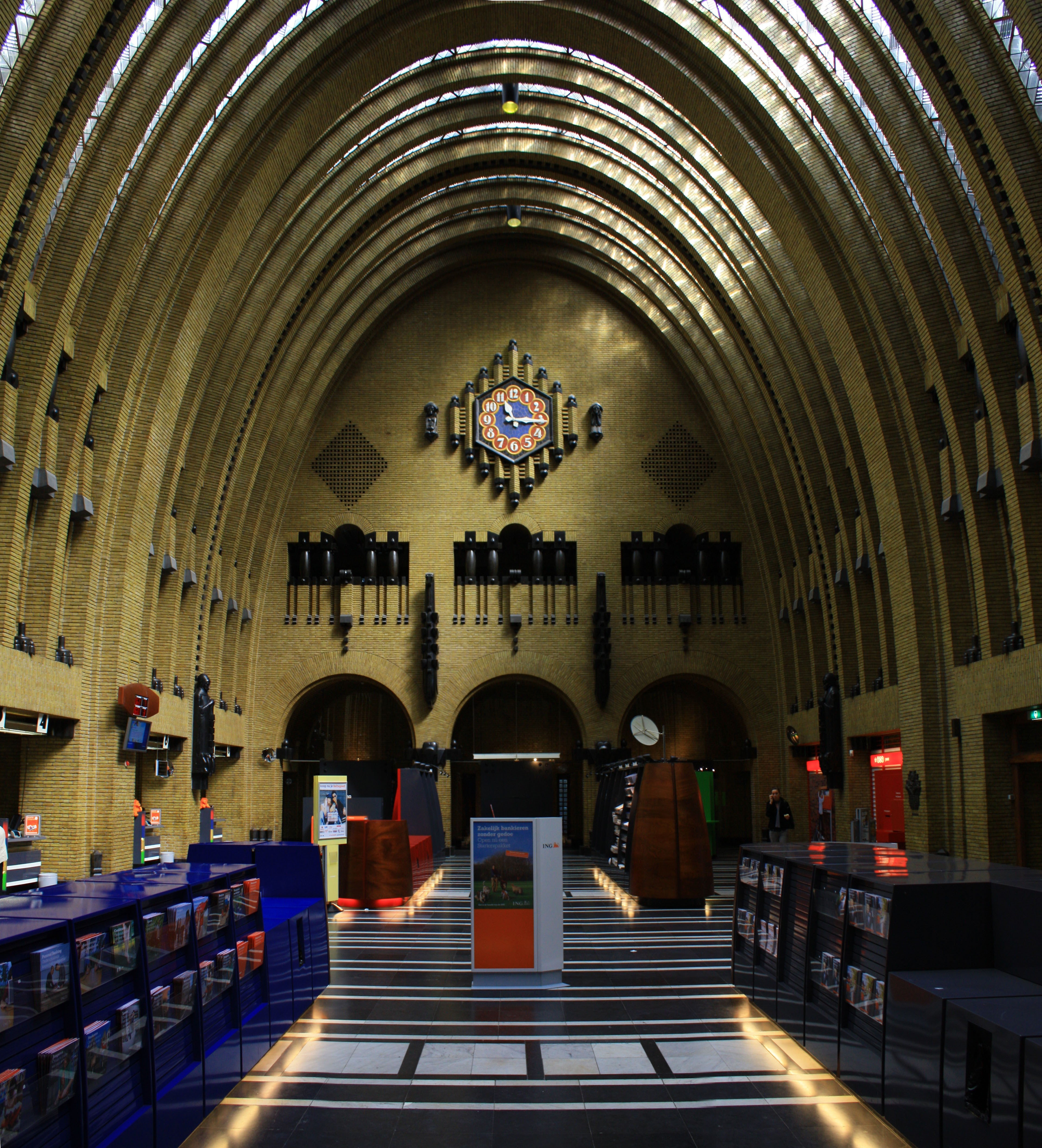 Interieur van het Hoofdpostkantoor aan de Neude te Utrecht